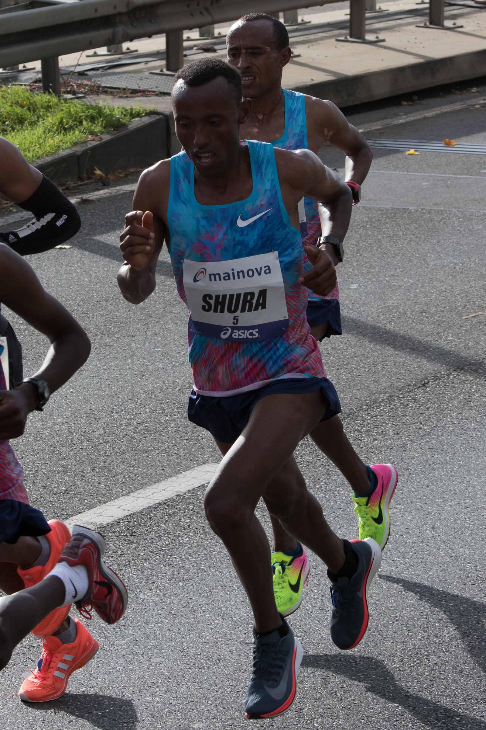 Shura Kitata Tola während des Frankfurt Marathons, 2017